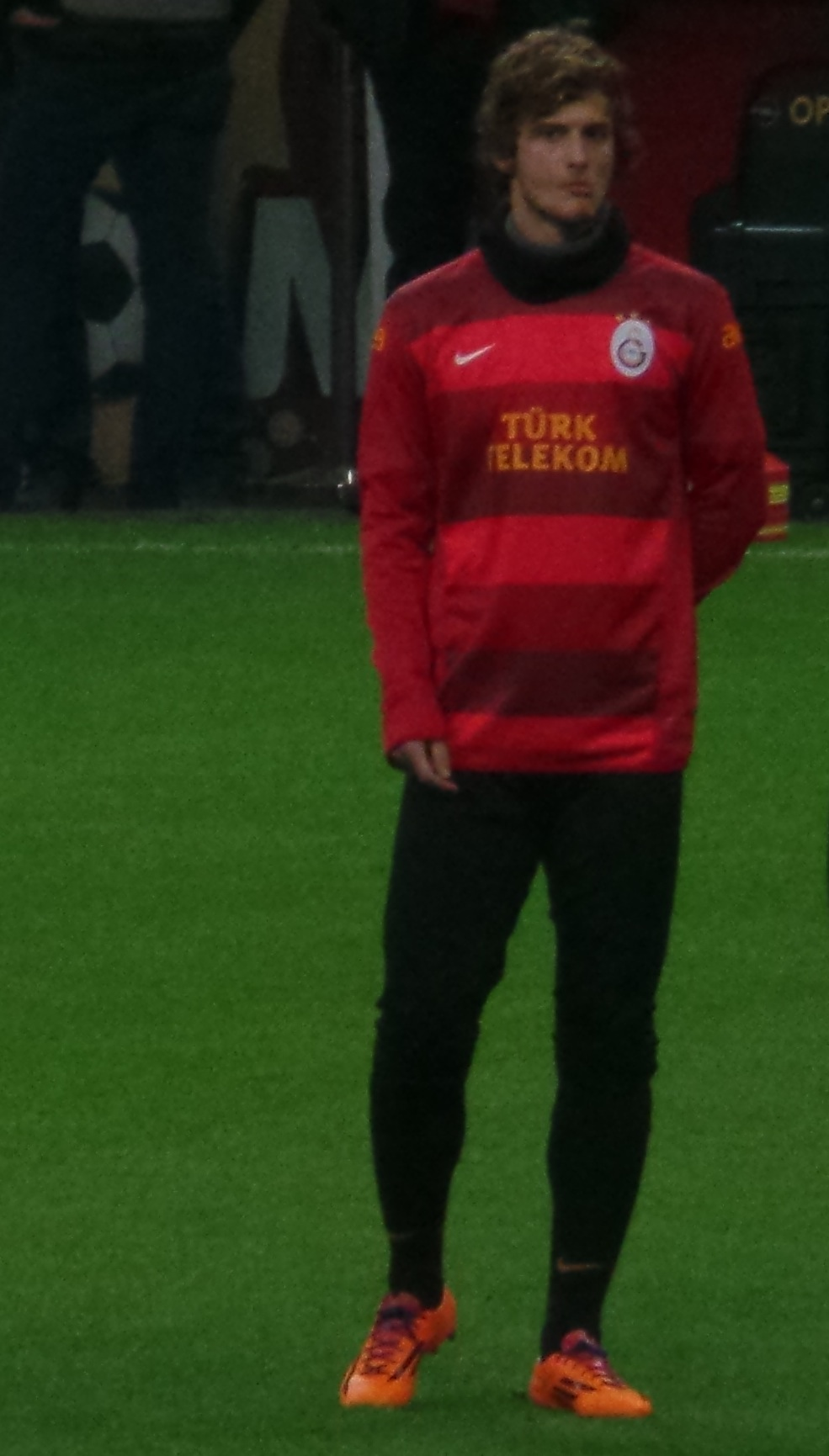 Berk İsmail Ünsal ilk Süper Lig karşılaşmasında.